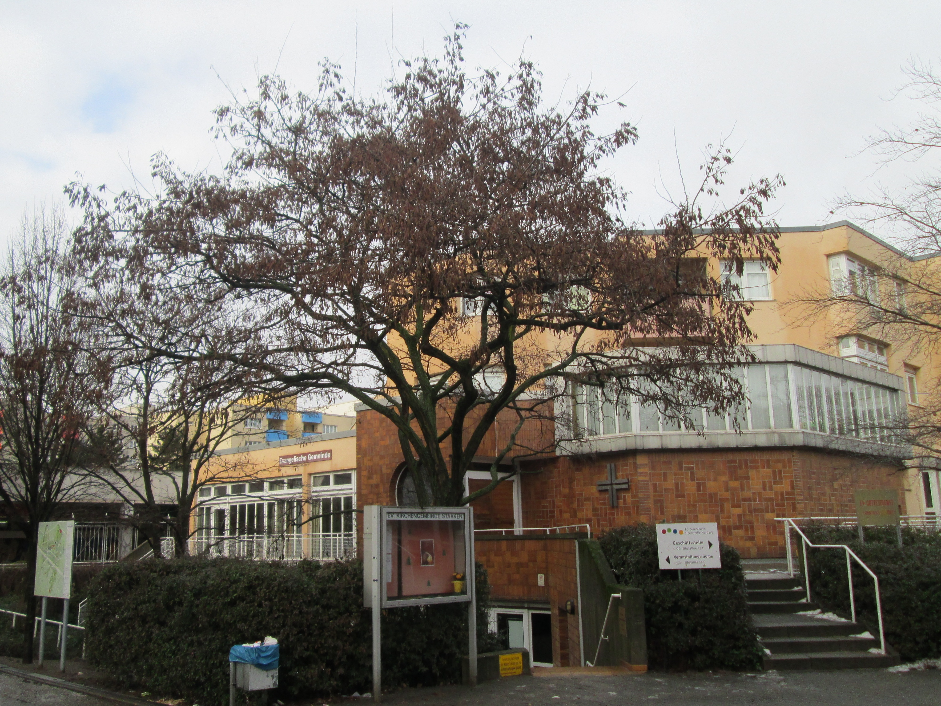 Evangelisches Gemeinwesenzentrum Berlin-Staaken, Blick von Süden